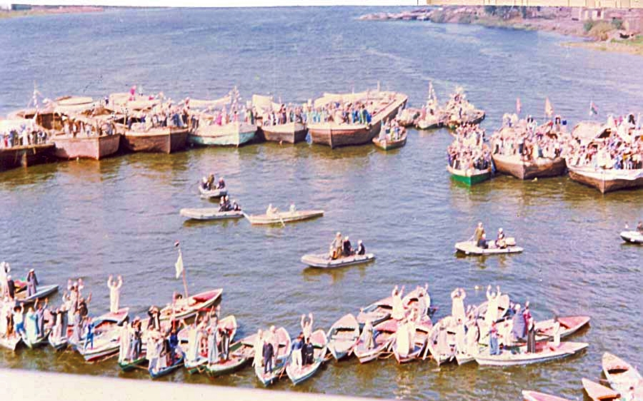 الصيد ببحيرة البرلس